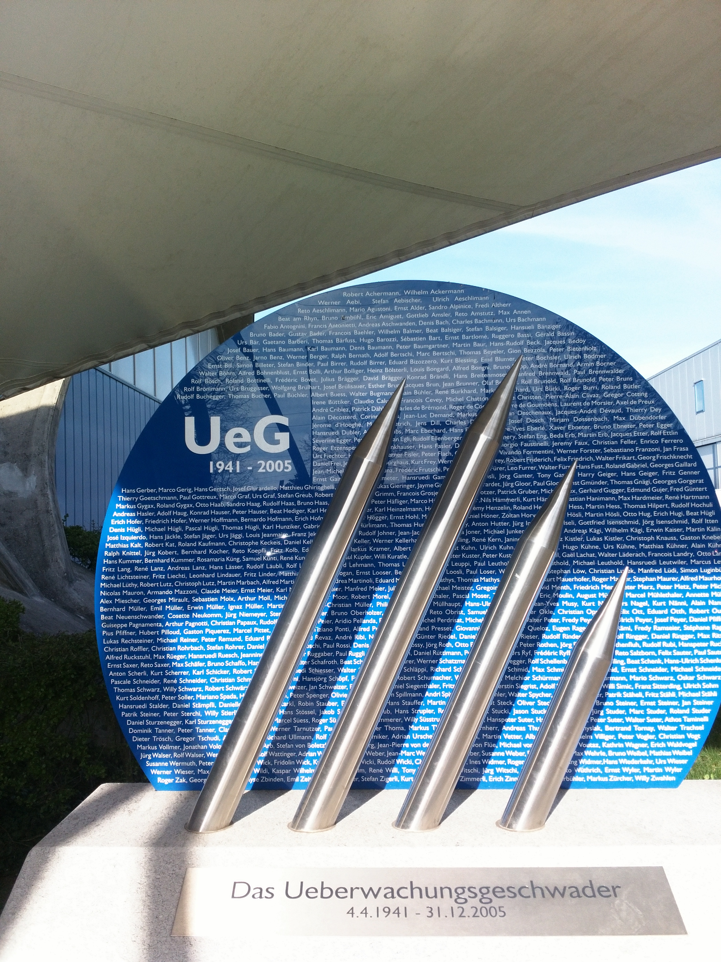 Denkmal UeG Piloten